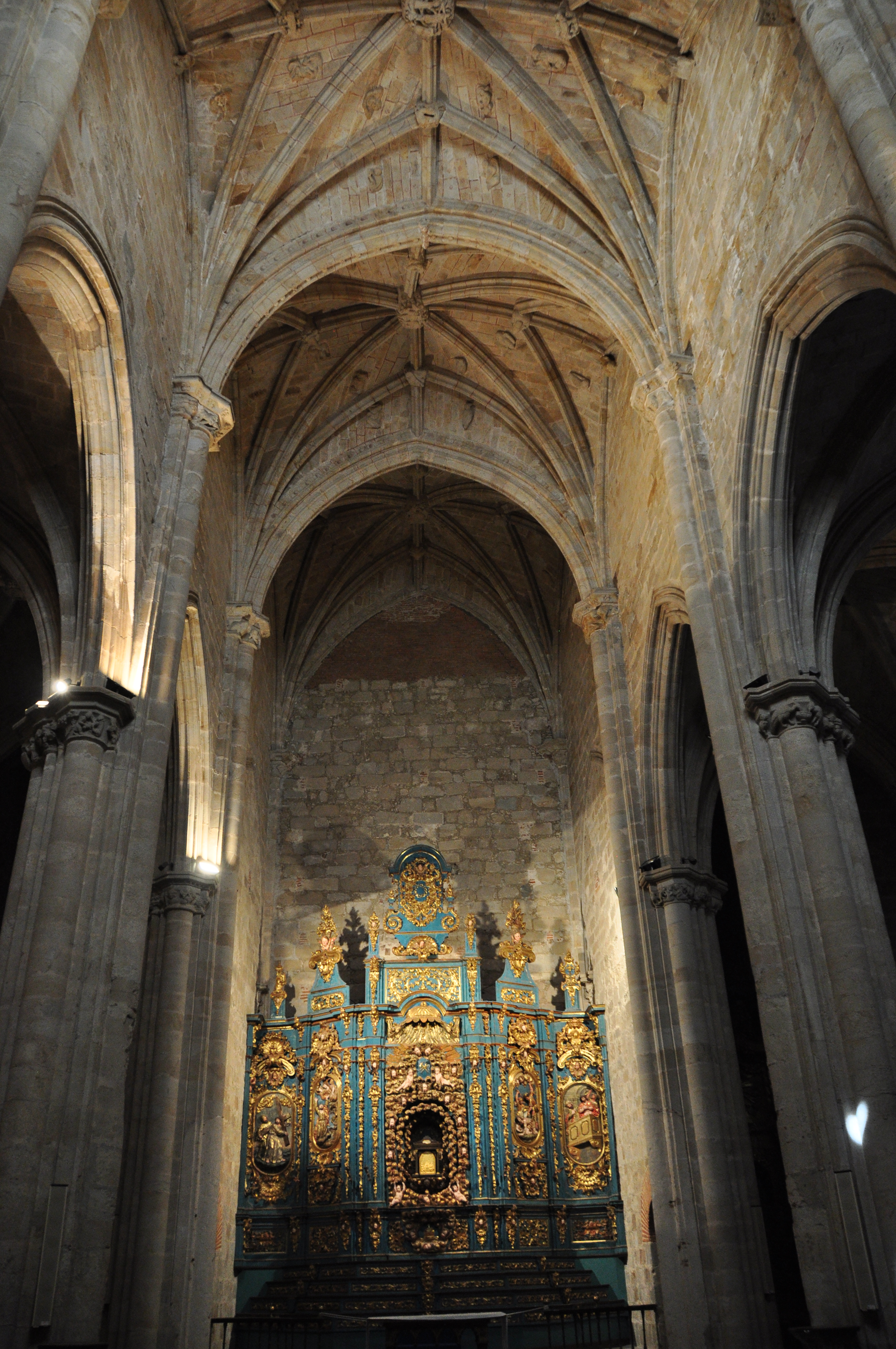 Nave central de la Catedral Vieja de Plasencia.